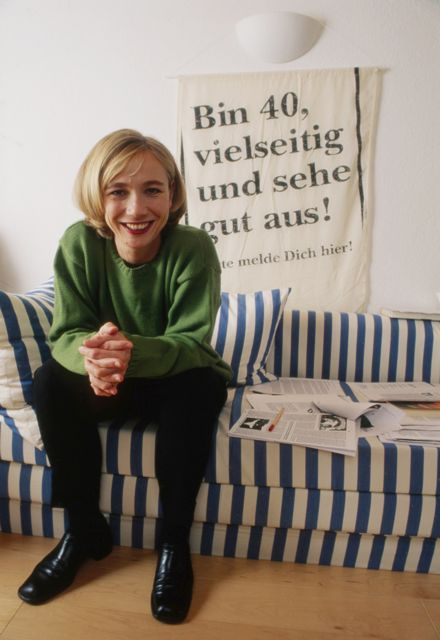 Amelie Fried im Oktober 1998